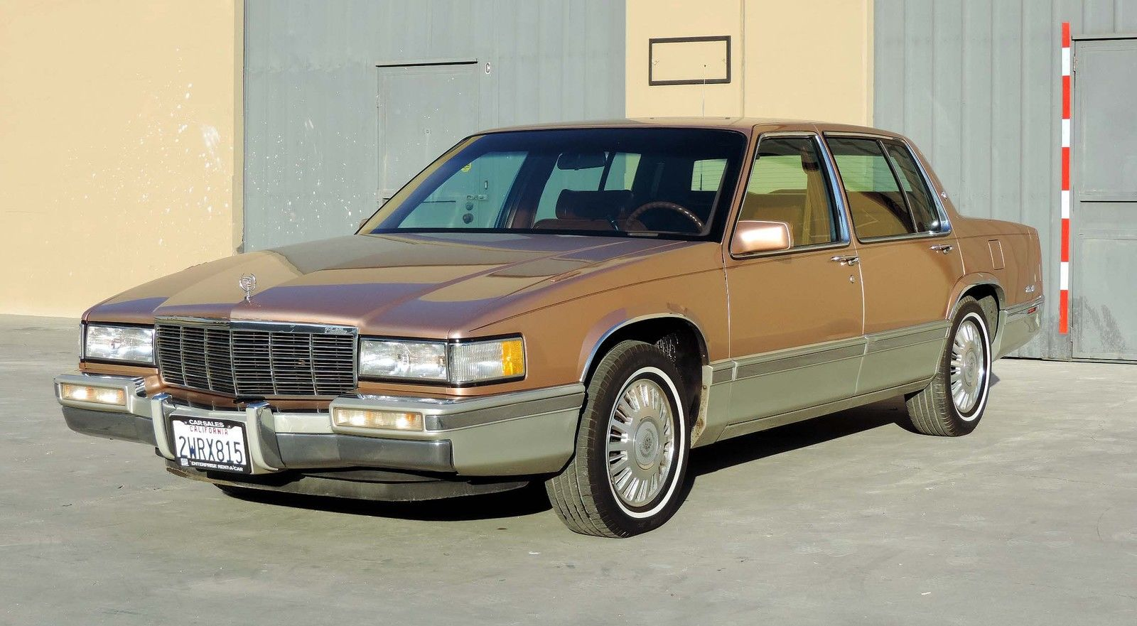 1991 Cadillac Sedan DeVille